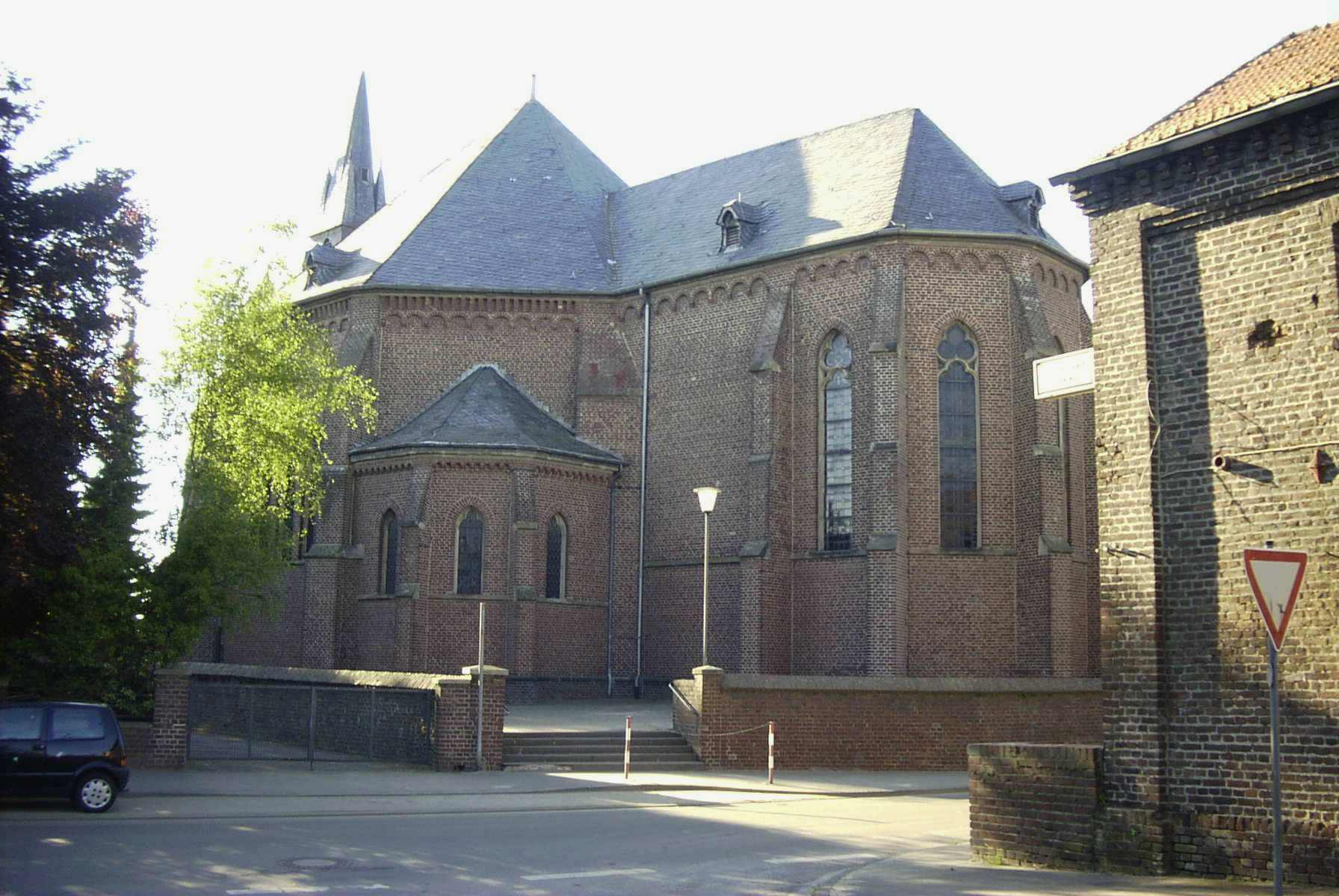 Summary Bildbeschreibung: Südostansicht der kath. Kirche Otzenrath Quelle: eigenes Foto Fotograf/Zeichner: bodoklecksel 21:16, 14. Jun 2006 (CEST) Datum: Juni 2006 Sonstiges: ...